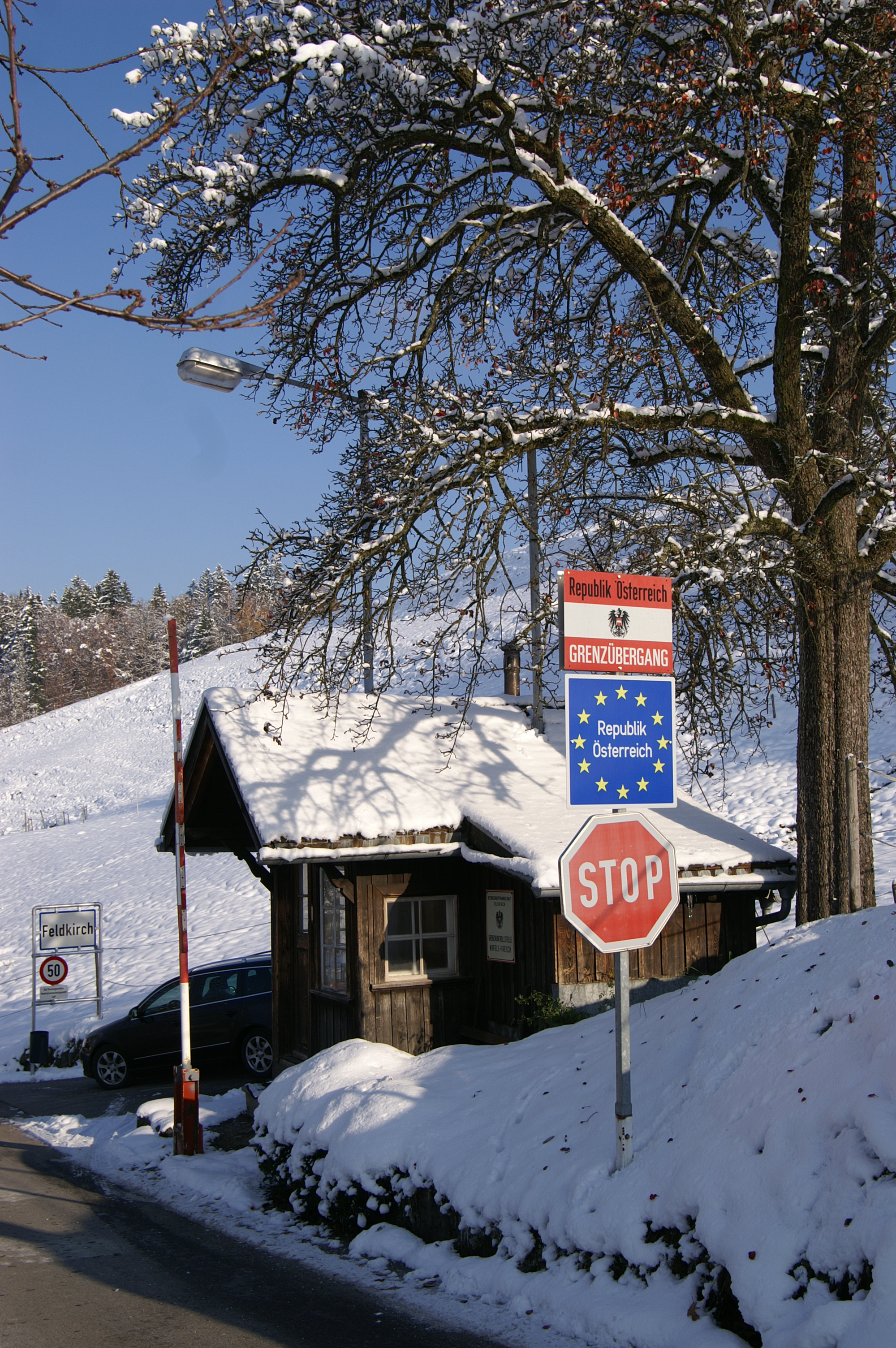 Grenzübergang "Feldkirch - Fresch" im Ortsteil Nofels von Feldkirch, in Vorarlberg. Er verbindet das Fürstentum Liechtenstein mit Österreich.